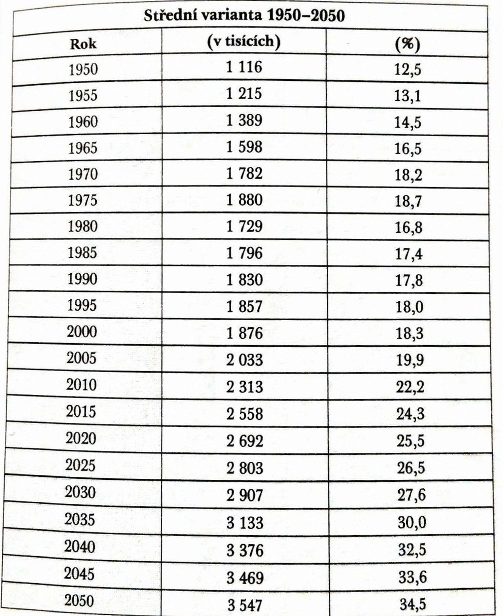 Z této tabulky lze vyčíst, jaké bylo a jaké pravděpodobně bude procentuální zastoupení seniorů v České republice v následujících letech. V průběhu 100 let se počet seniorů zvýší o cca 2 400 tisíc.